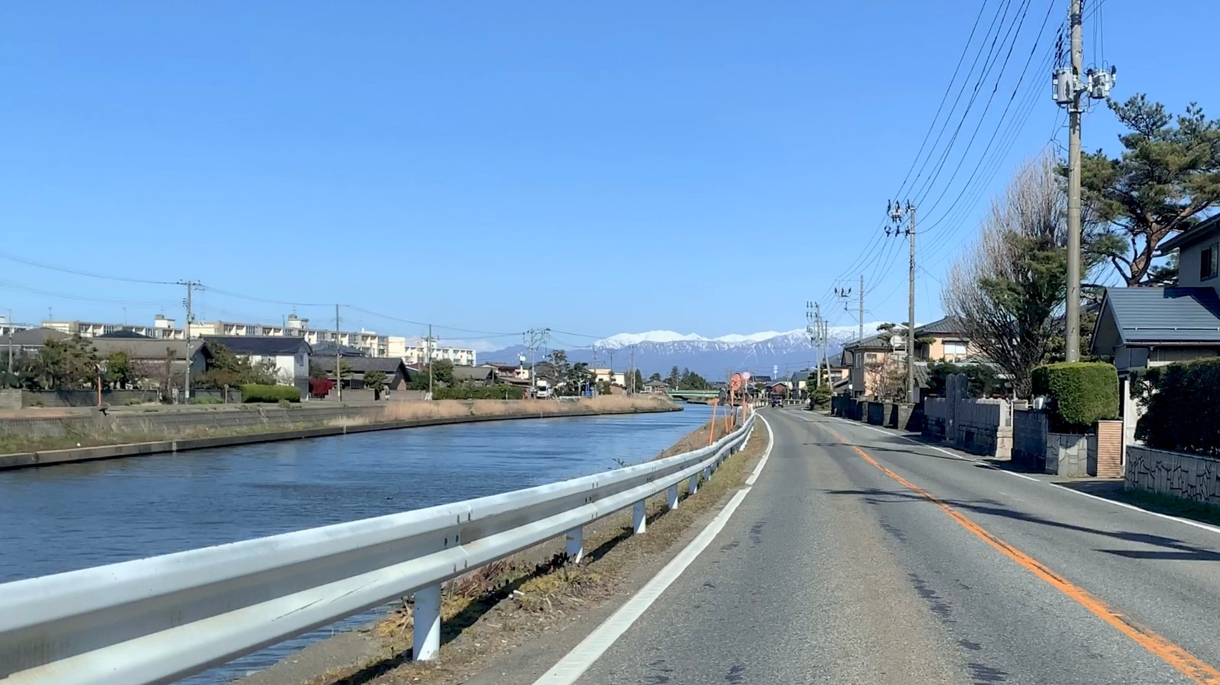 新潟県道15号新潟長浦水原線 早通団地と新井郷川（2020年4月）